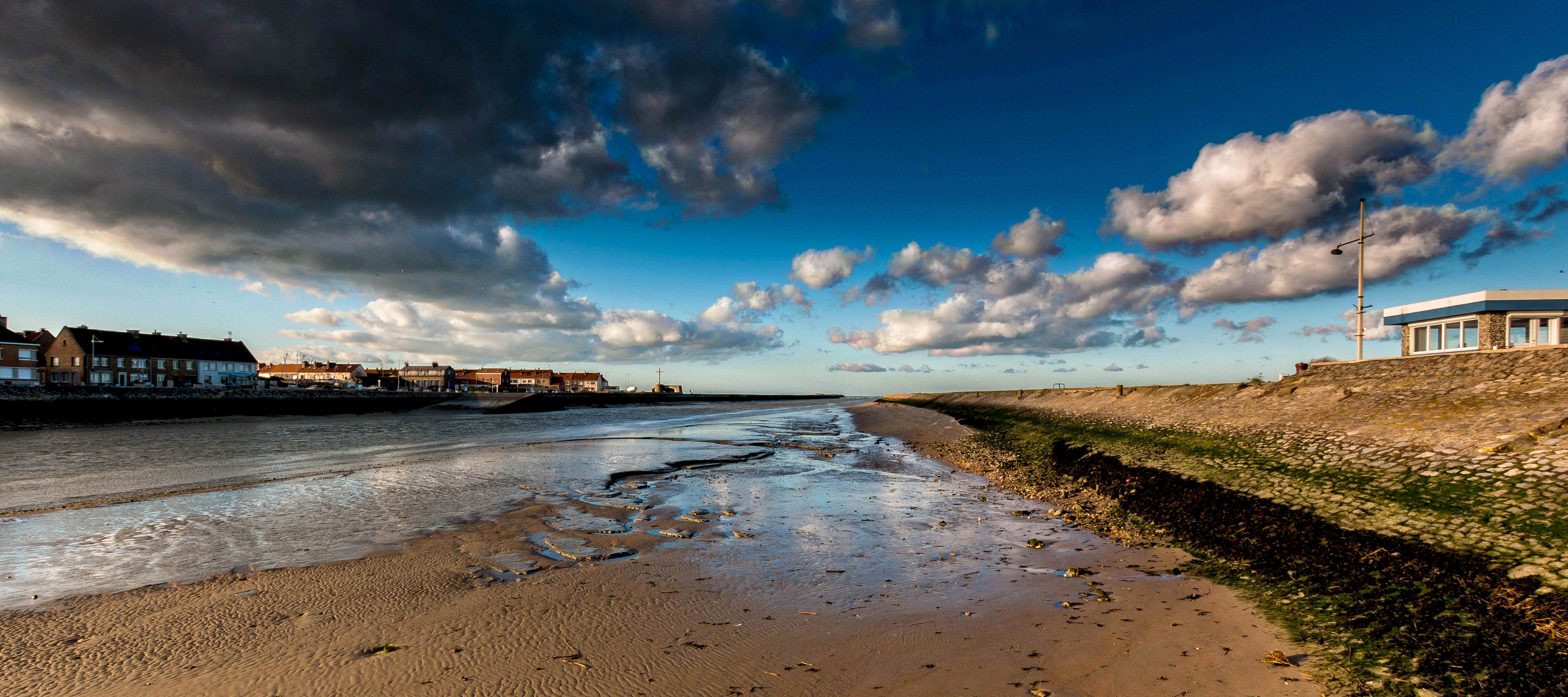 Embouchure du fleuve Aa (entre Gravelines et Grand Fort Philippe)